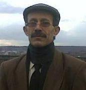 الكاتب على السورقي